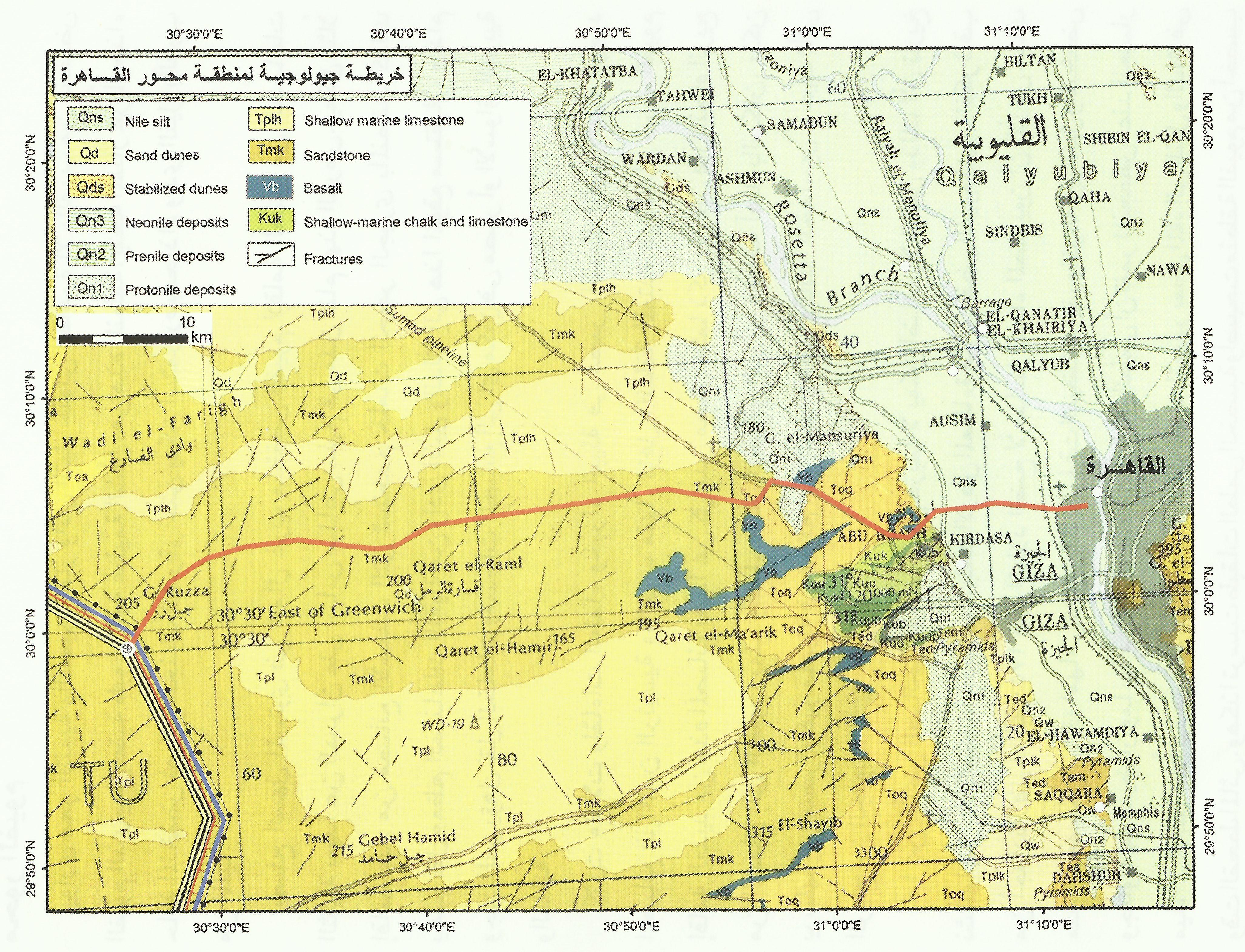 محور تعمير القاهرة